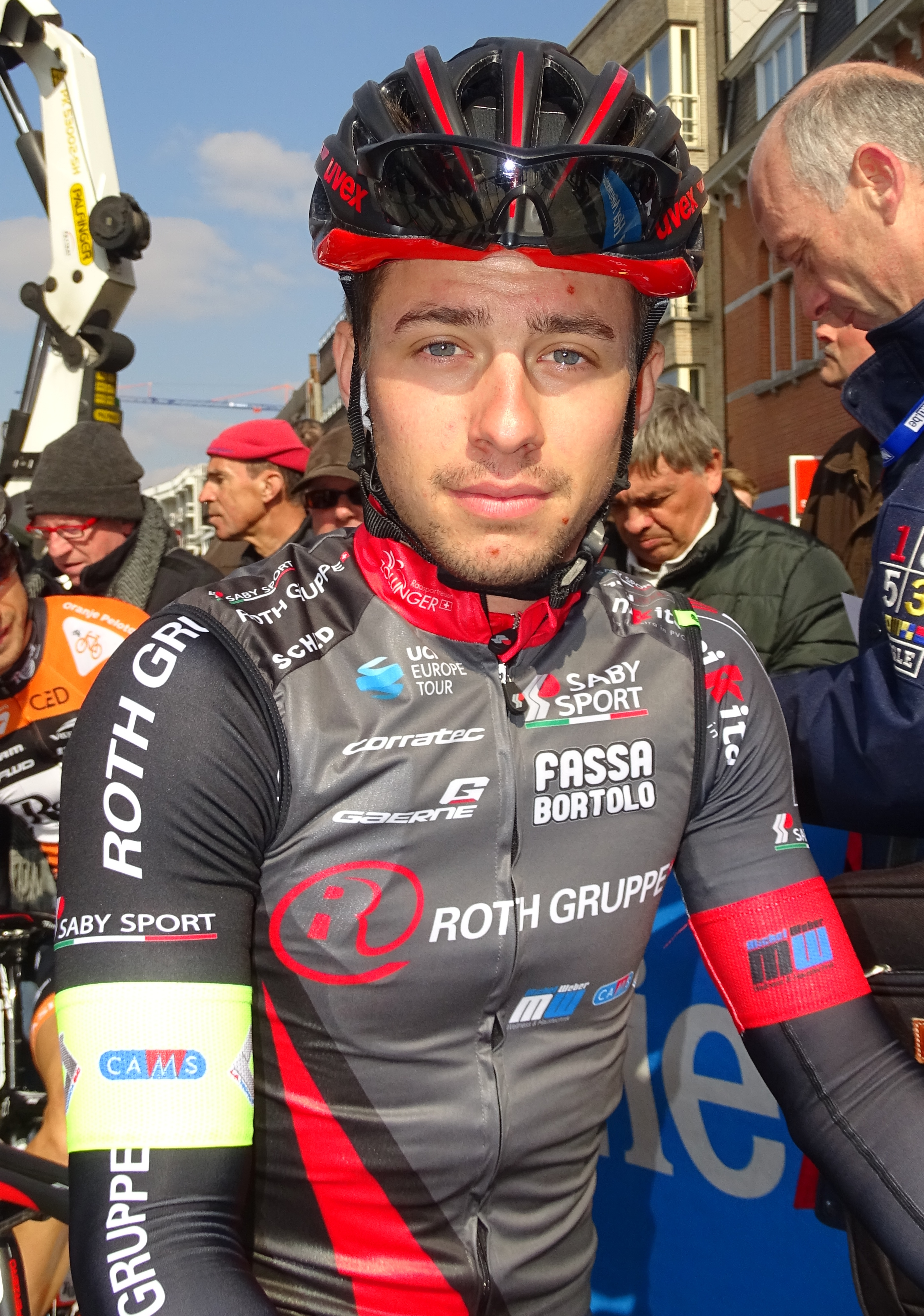 Reportage réalisé le mercredi 16 mars à l'occasion du départ de la Nokere Koerse 2016 à Deinze, Belgique.